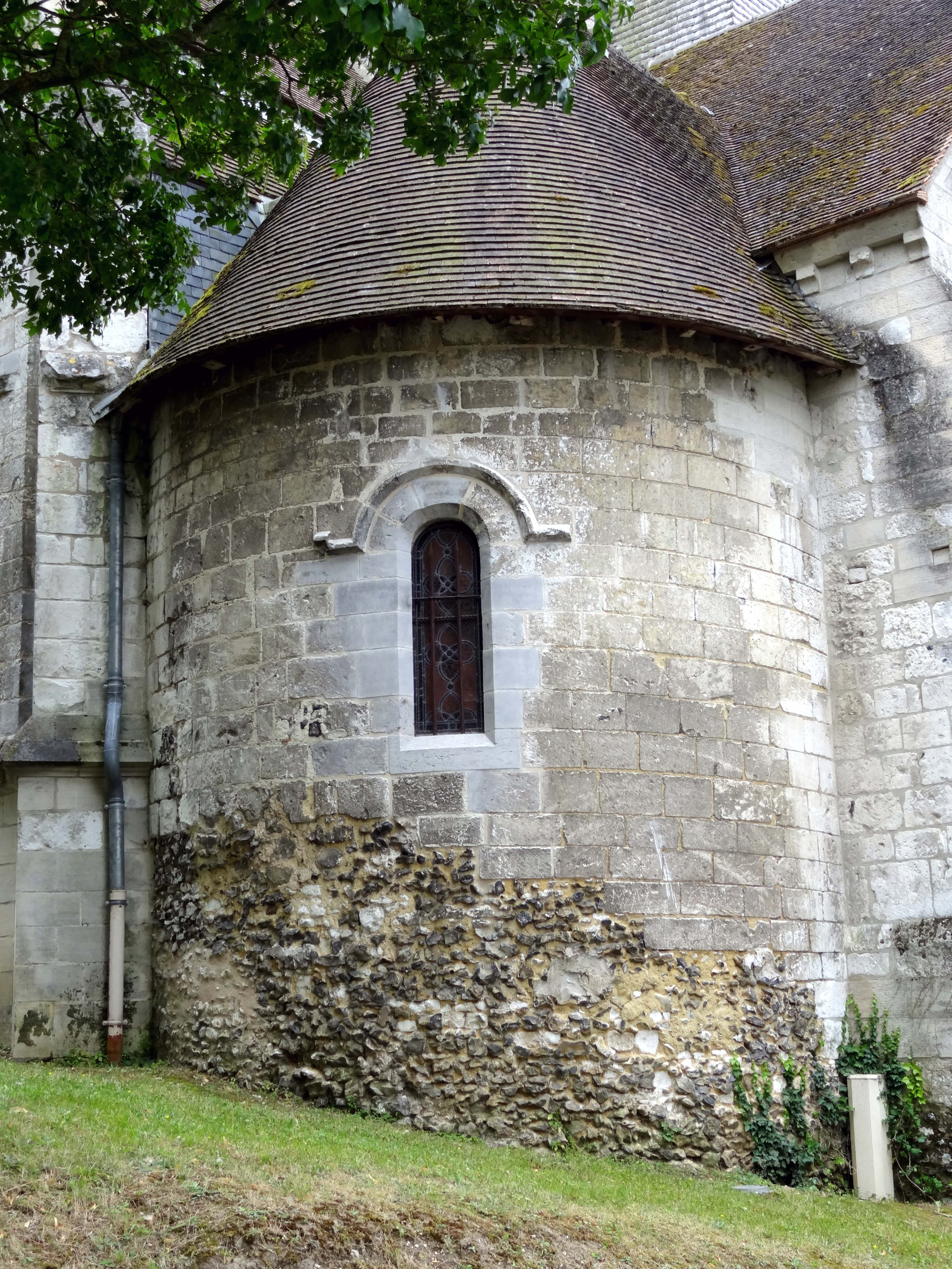 Église Notre-Dame de Marissel - voir titre.